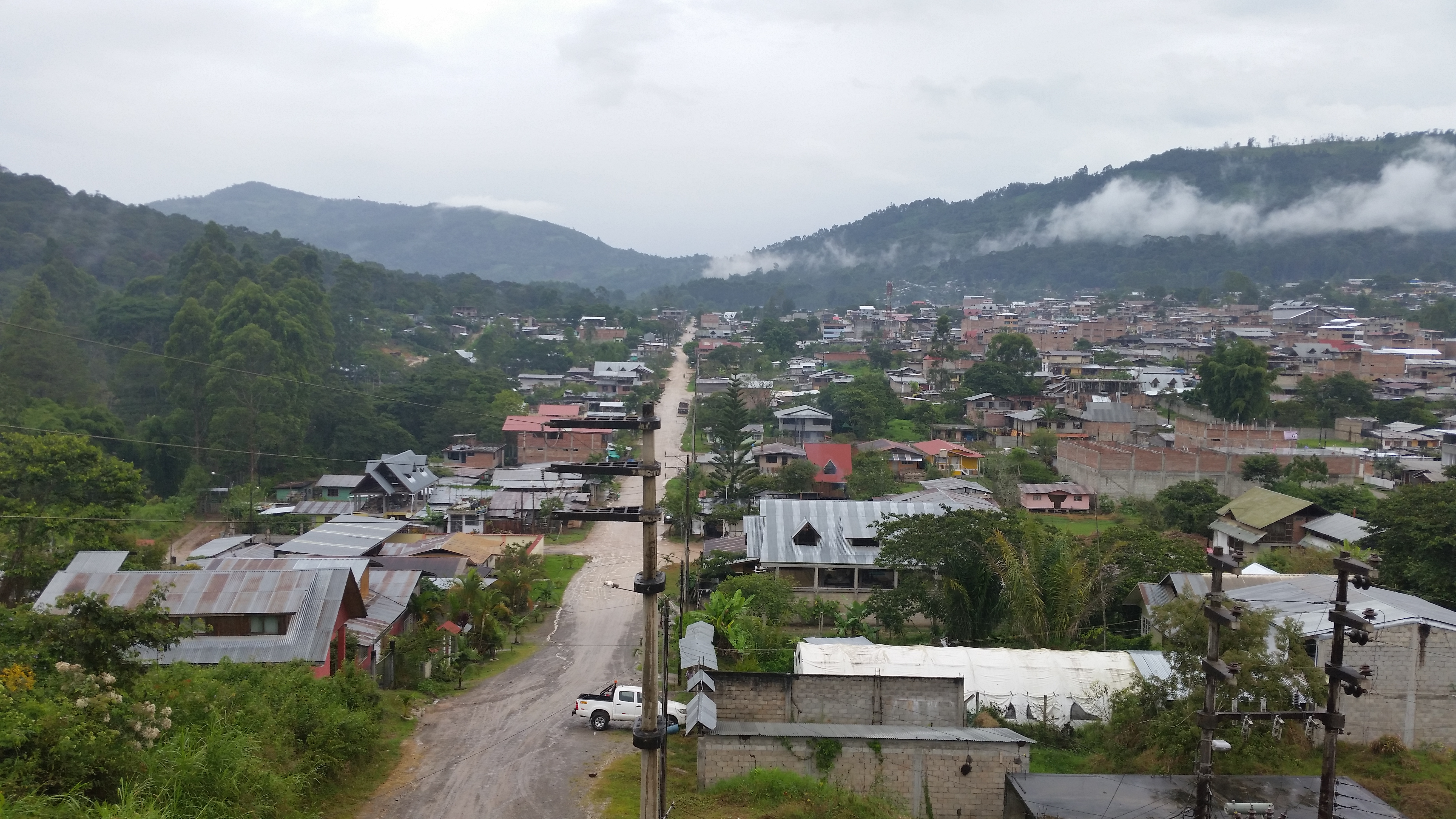 Villa Rica, Peru